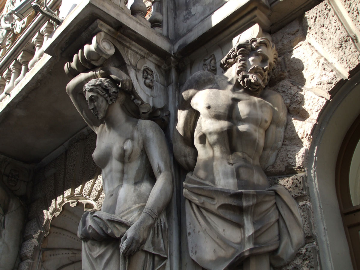 Особняк П. Н. Демидова, ул. Большая Морская, 45. Атлант и кариатида.